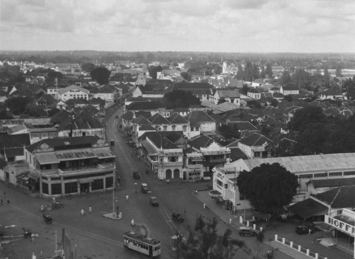 Foto. Pasar Besar in Soerabaja